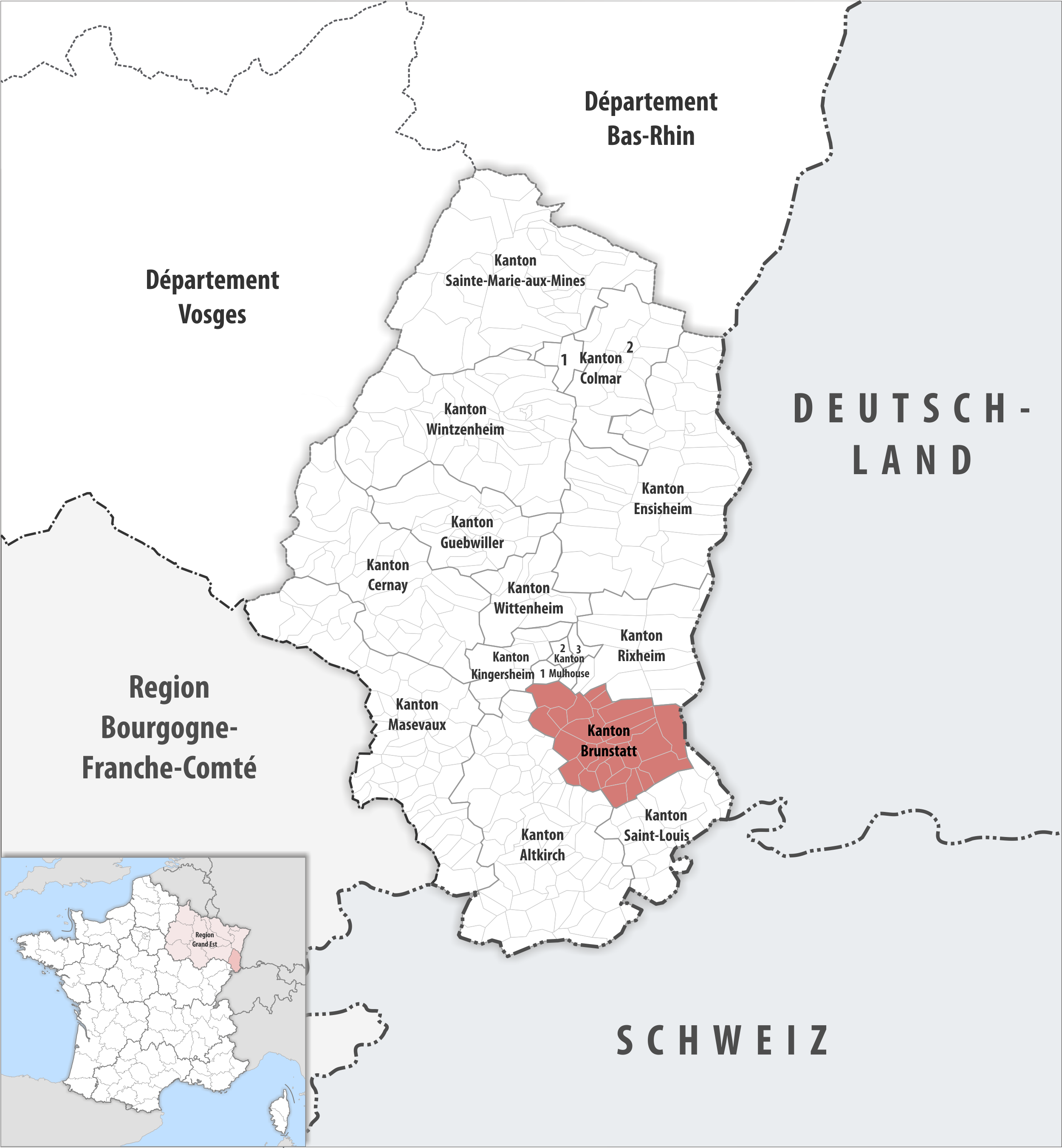 Lage des Kantons Brunstatt